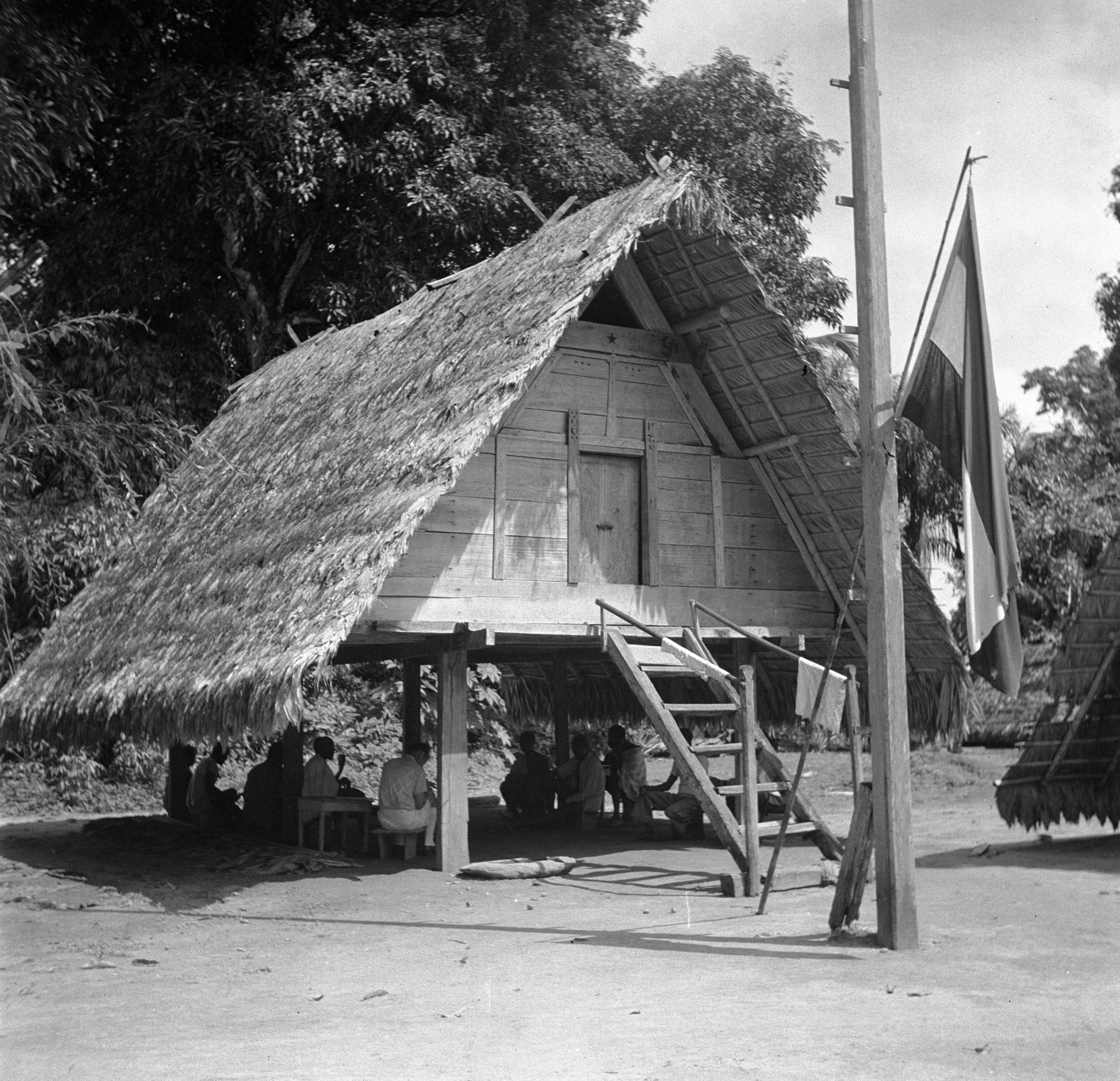 Collectie / Archief : Fotocollectie Van de Poll Reportage / Serie : Reis naar Suriname en de Nederlandse Antillen Beschrijving : Bijeenkomst onder een paalwoning in Langetabbetje in Suriname. De Nederlandse vlag hangt uit. Datum : 1947 Locatie : Langatabbetje, Marowijne, Suriname Trefwoorden : bijeenkomsten, hutten, inheemse bevolking, vlaggen Fotograaf : Poll, Willem van de, [onbekend] Auteursrechthebbende : Nationaal Archief Materiaalsoort : Negatief (zwart/wit) Nummer archiefinventaris : bekijk toegang 2.24.14.02 Bestanddeelnummer : 252-6713